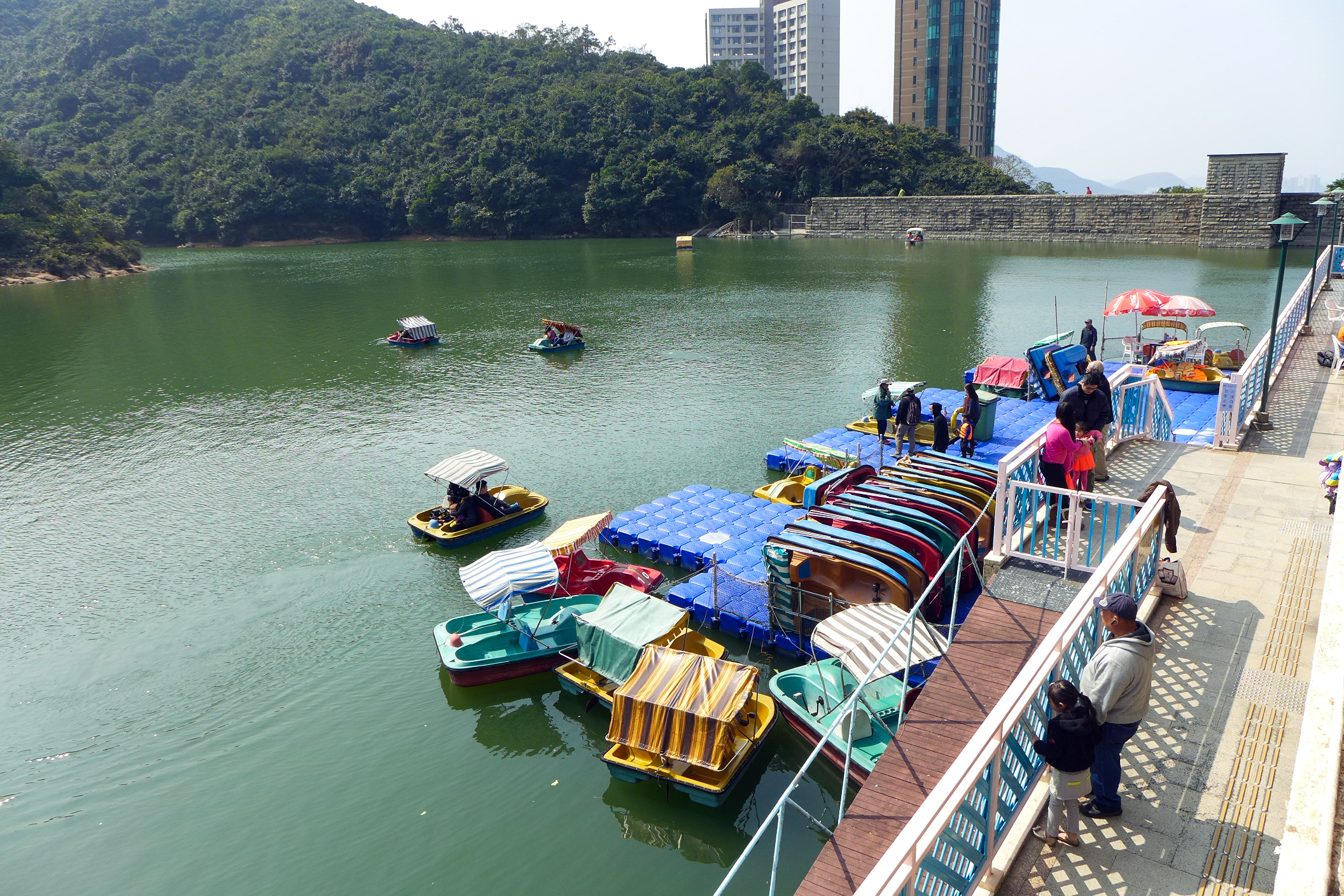 Wong Nai Chung Reservoir pier